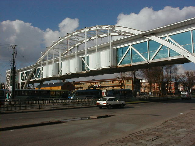 Puente Peatonal que cruza la Avenida 21 de Mayo, construida por la I. Municipalidad de Conceción bajo el mandato del Alcalde Ariel Ulloa Azocar. La estructura es de acero y esá conformada por un gran arco soportante de una jaula techada y totalmente cubierta. En su interior alberga puestos comerciales y cuenta con escaleras y ascensores.